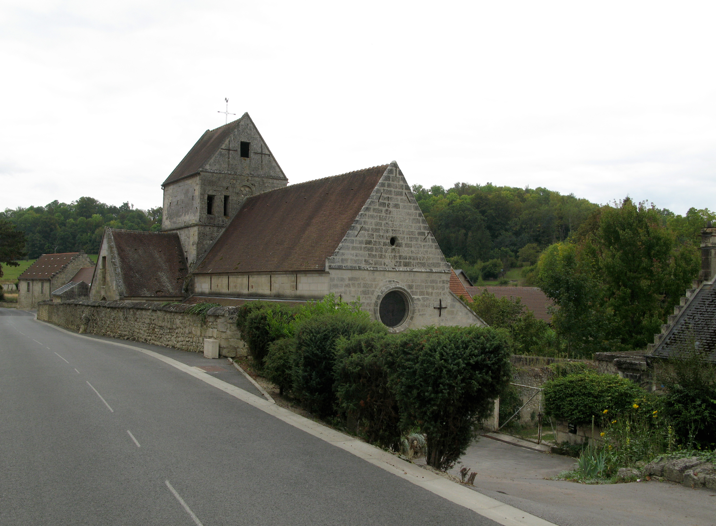 Serches (Aisne, France) - L'église est en contrebas de la route qui traverse le village. . .